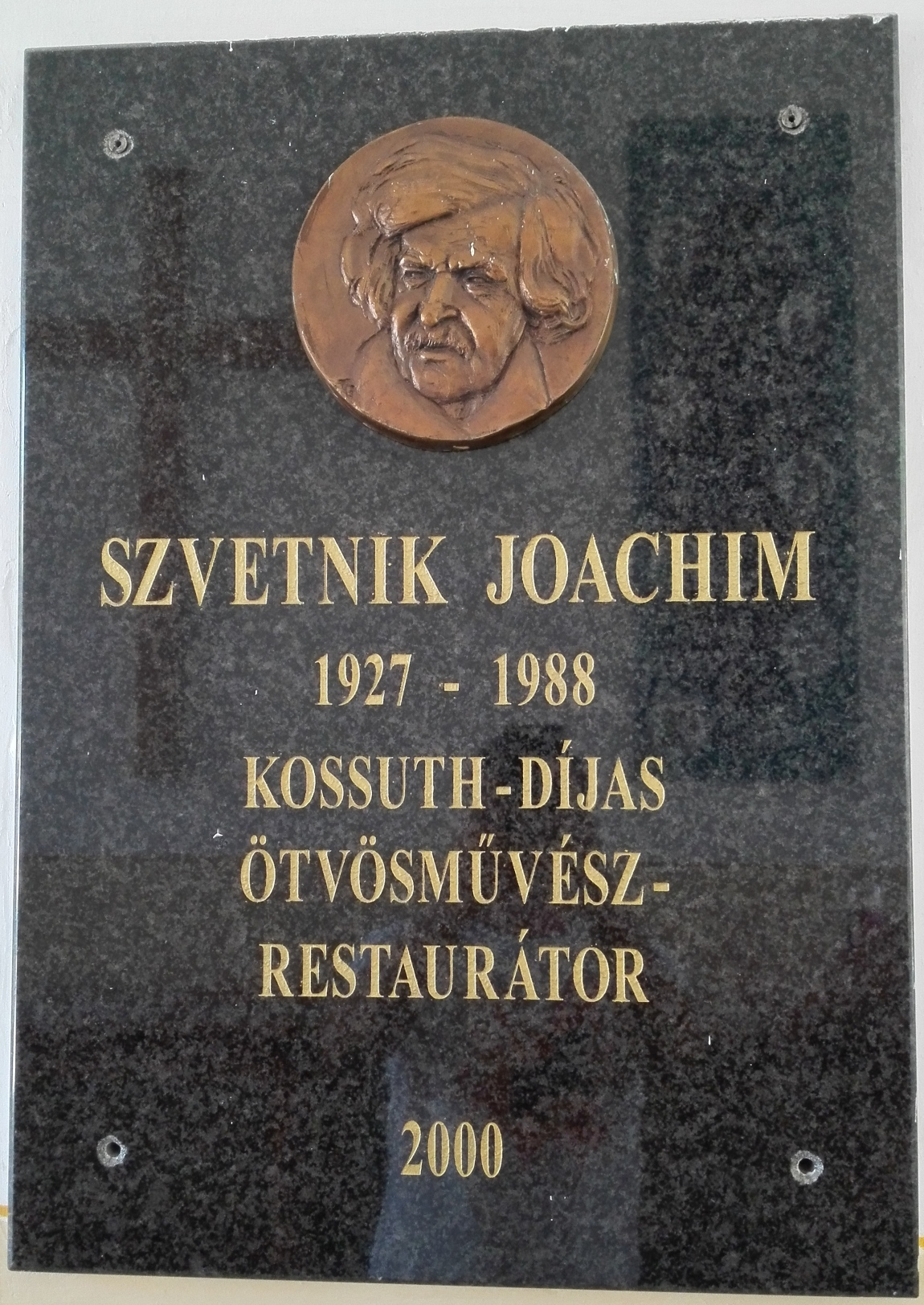 Szvetnik Joachim emléktáblája az iskola épületében